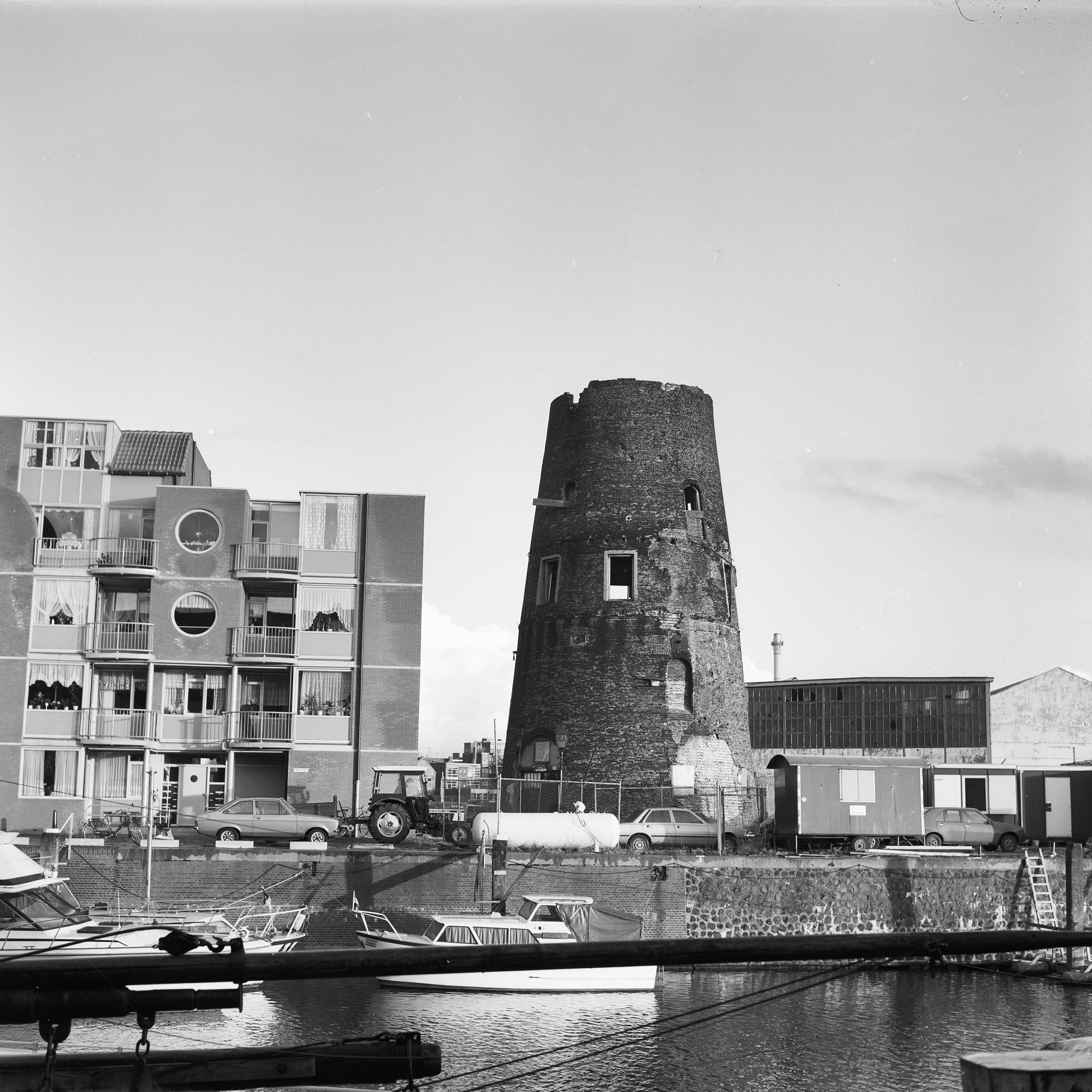 De Distilleerketel (1e): In verval geraakte molenstomp